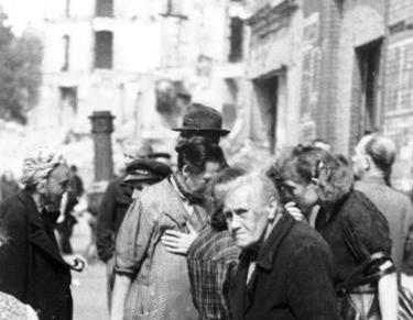 ADN-ZB/Donath Berlin 1945 Vor der Zentralmarkthalle am Alexanderplatz.